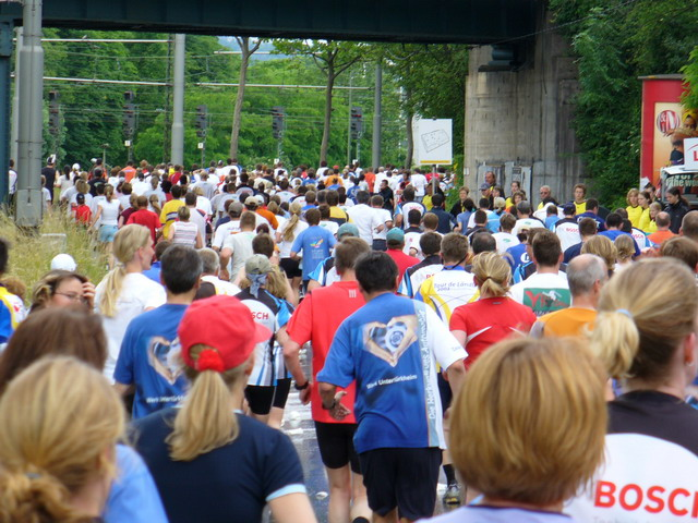 Stuttgarter Zeitungslauf 2005-06-05